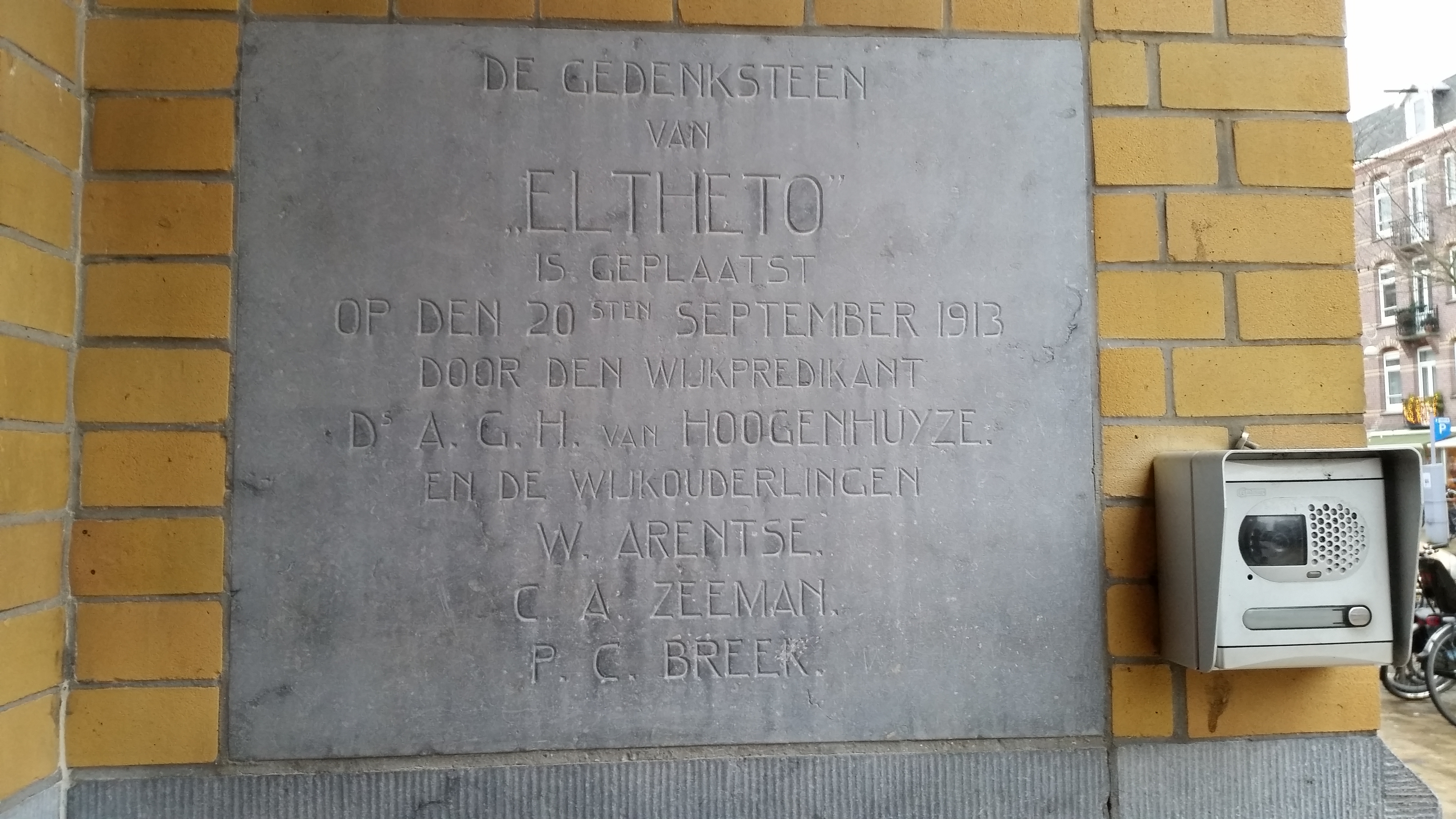 Het Elthetocomplex aan Javastraat 116-120, Amsterdam-Oost in januari 2020